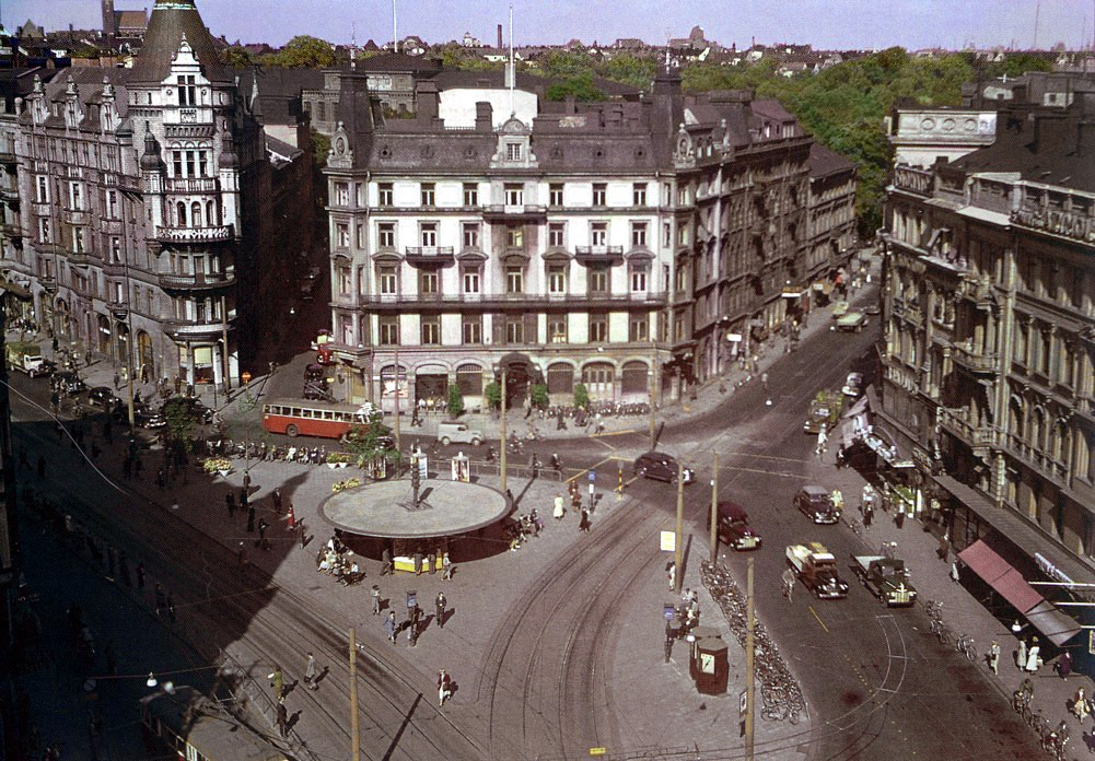 Stureplan i Stockholm i början av 1940-talet. I mitten Holger Bloms "Svampen" från 1937 och i bakgrunden det numera rivna Hôtel Anglais. (digitally restored version)